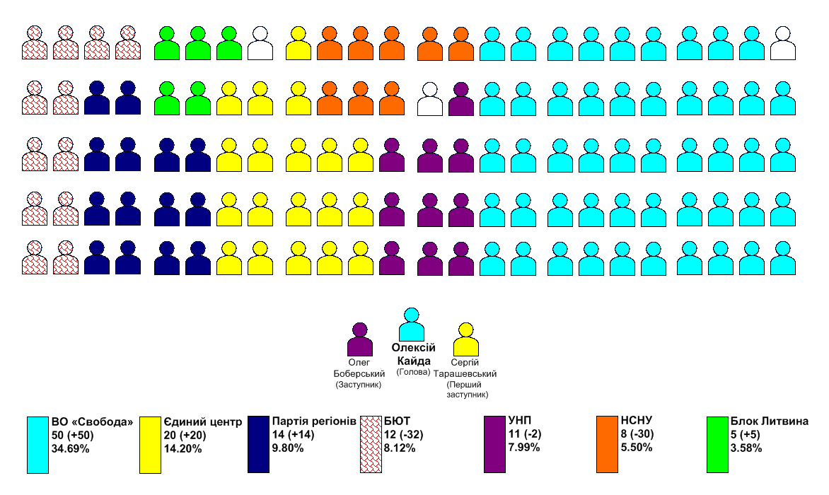 Результати виборів до Тернопільської обласної ради 2009 року